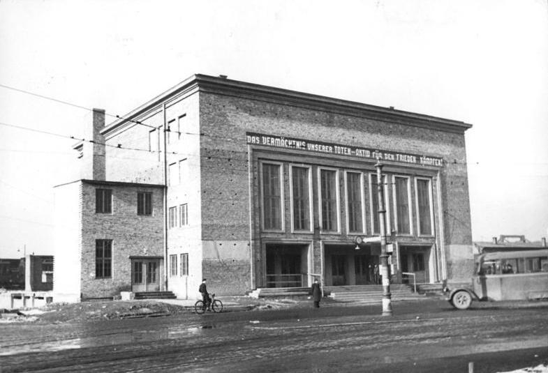 Dessau, Hauptbahnhof Illus Biscan 31.3.51 Dessauer Hauptbahnhof wieder aufgebaut. Der am 7.März 1945 durch anglo-amerikanische Bomben zerstörte Dessauer Hauptbahnhof ist als das modernste Bahnhofsgebäude Sachsen-Anhalts neu entstanden und kürzlich in Betrieb genommen worden. Seit der Zerstörung waren alle Diensträume, Wartesäle etc. in Baracken untergebracht gewesen.